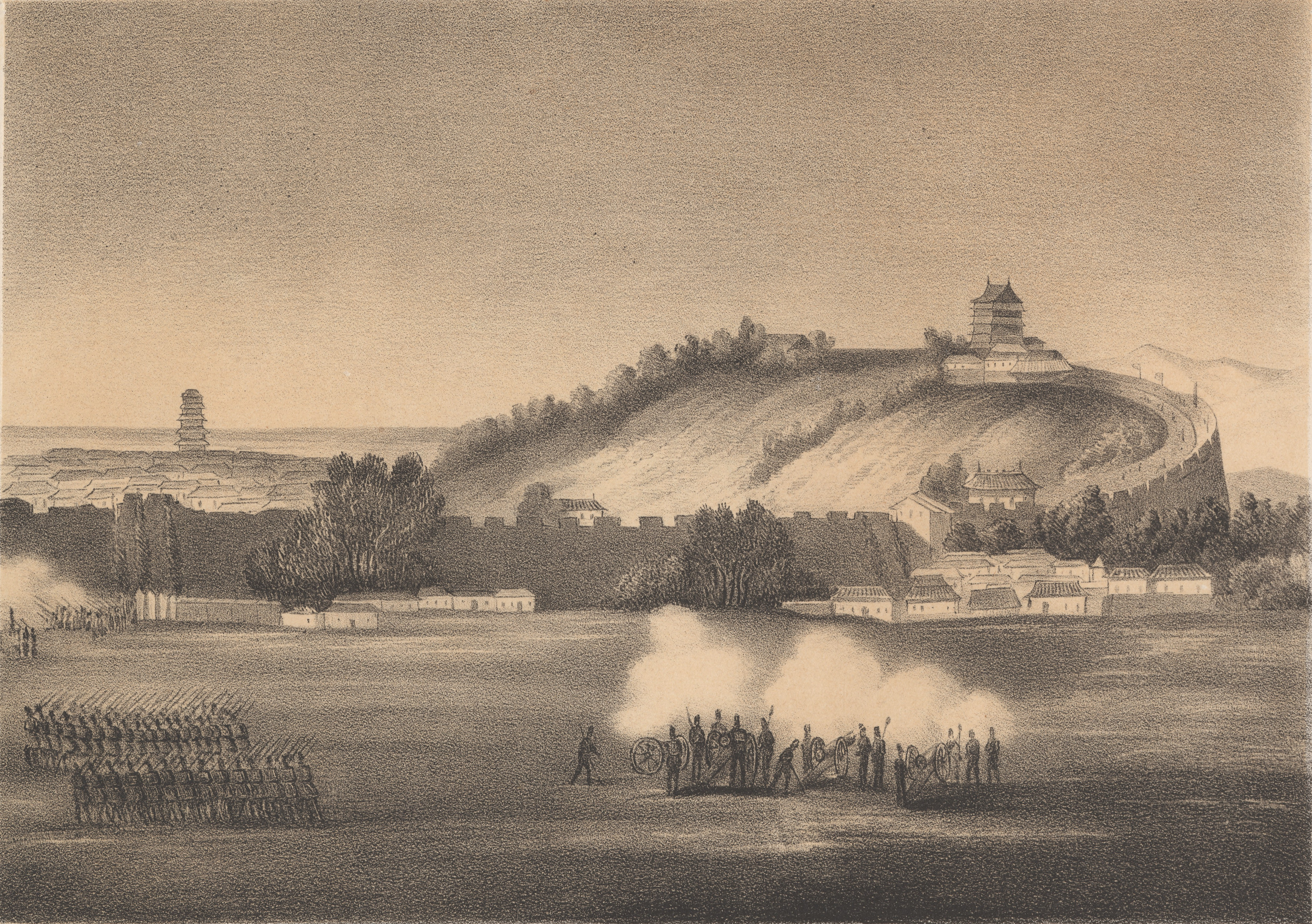 Einnahme u. Bombardement von Canton in China, durch die engl. franz. Armee den 28 Dezember 1857.